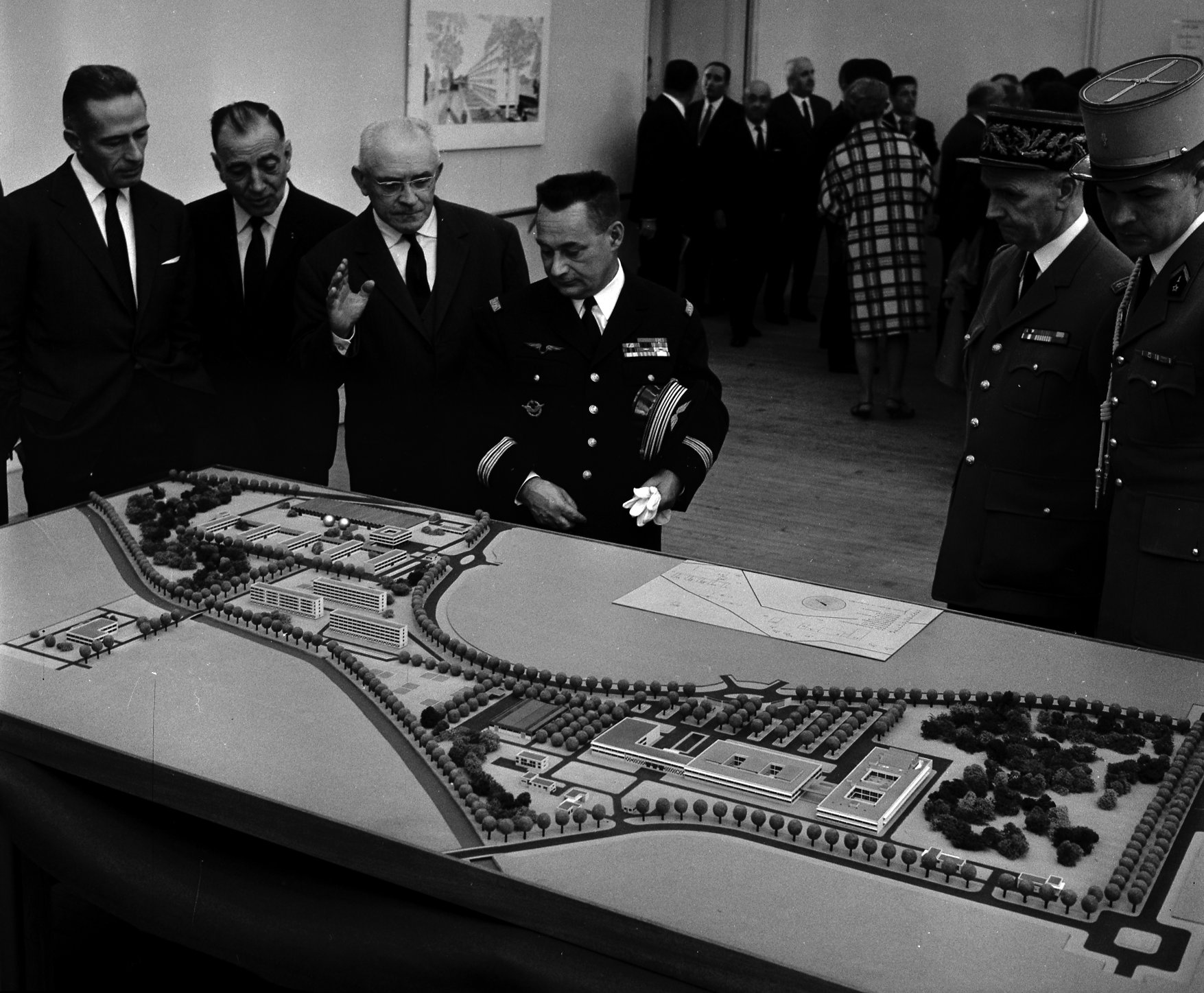 Pas de lieu. Le 21 Octobre 1968. Vue de Louis Messmer, ministre des Armées, lors de sa visite pour poser la première pierre de l'ENSA.